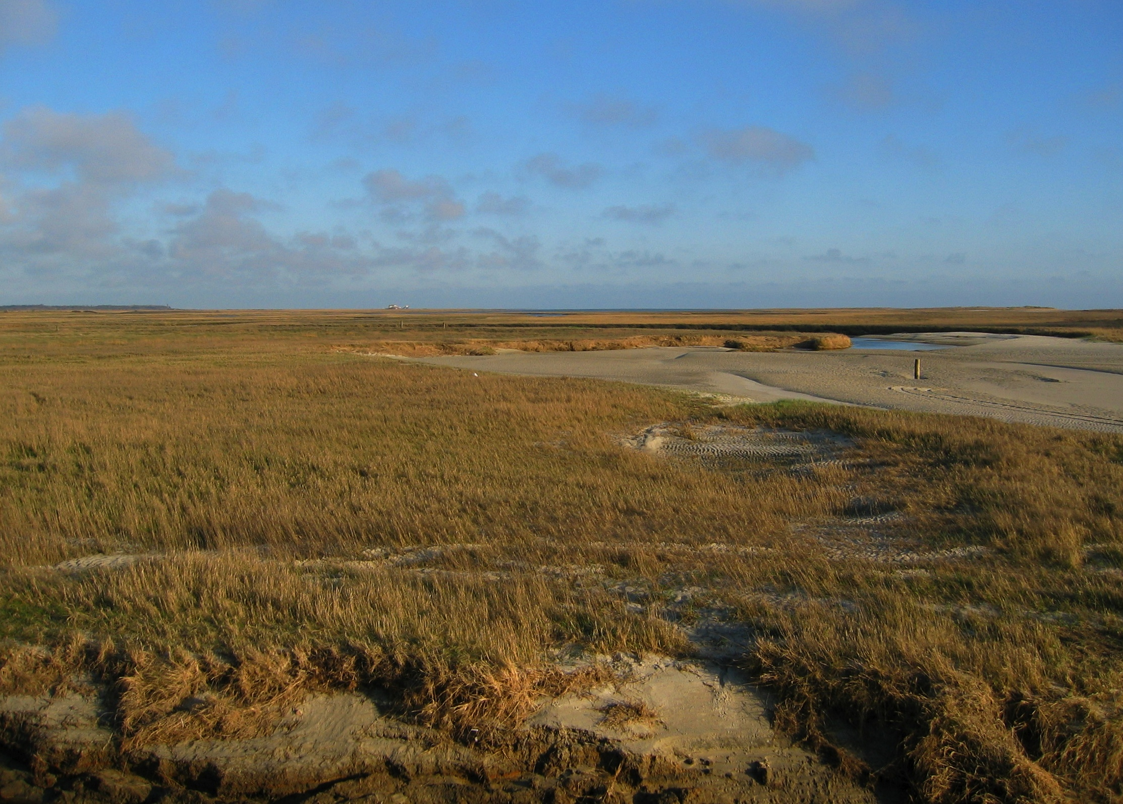 Sandiger Salzwiesenbereich vor dem Strand in Sankt Peter-Ording, Bad; aufgenommen von der Seebrücke aus.